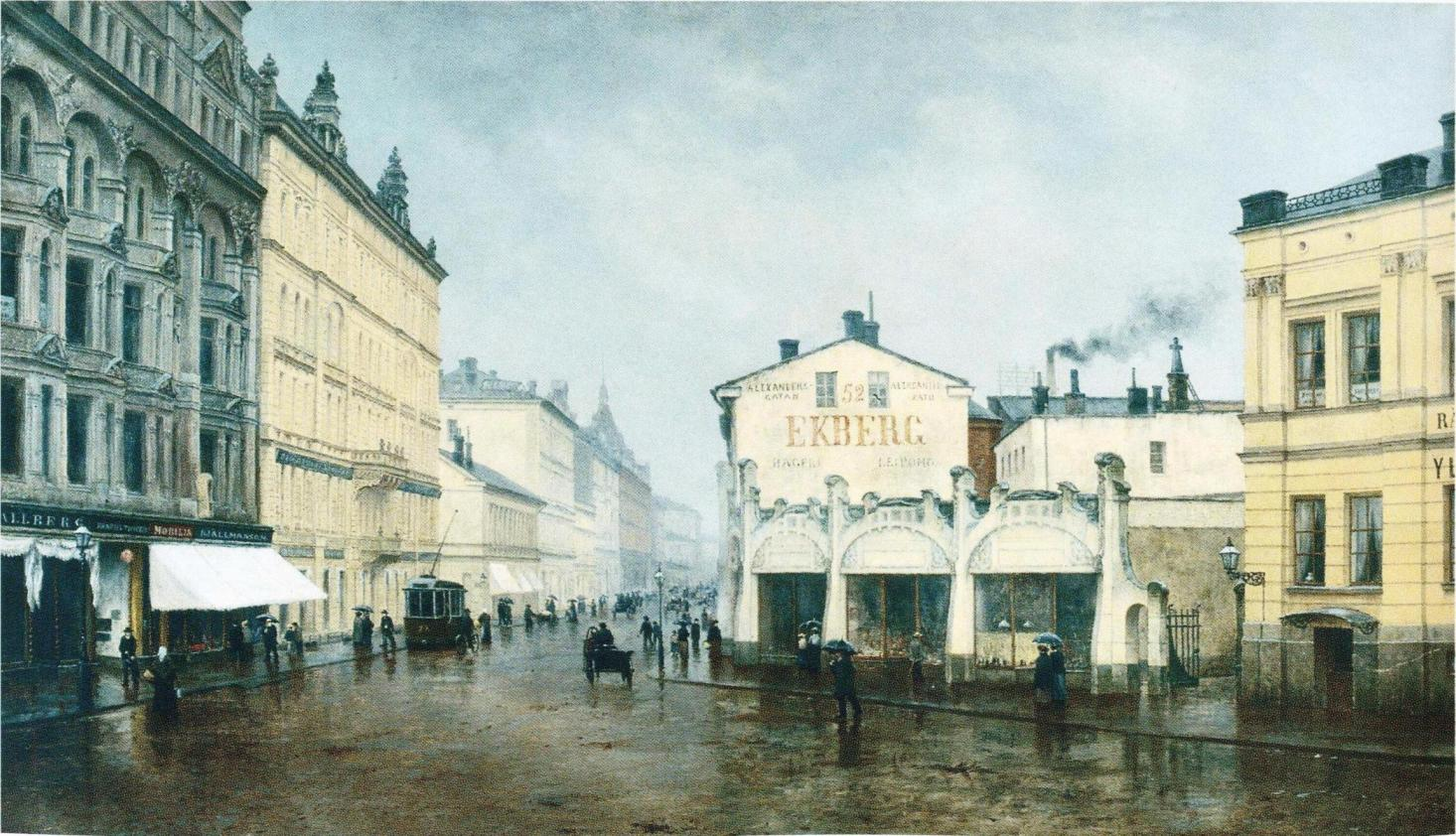 Oscar Kleinehin maalaus Helsingin Aleksanterinkadun länsipäästä, vasemmalla vuonna 1899 valmistunut Tallbergin talo. Maalaus kuuluu yksityiskokoelmaan.